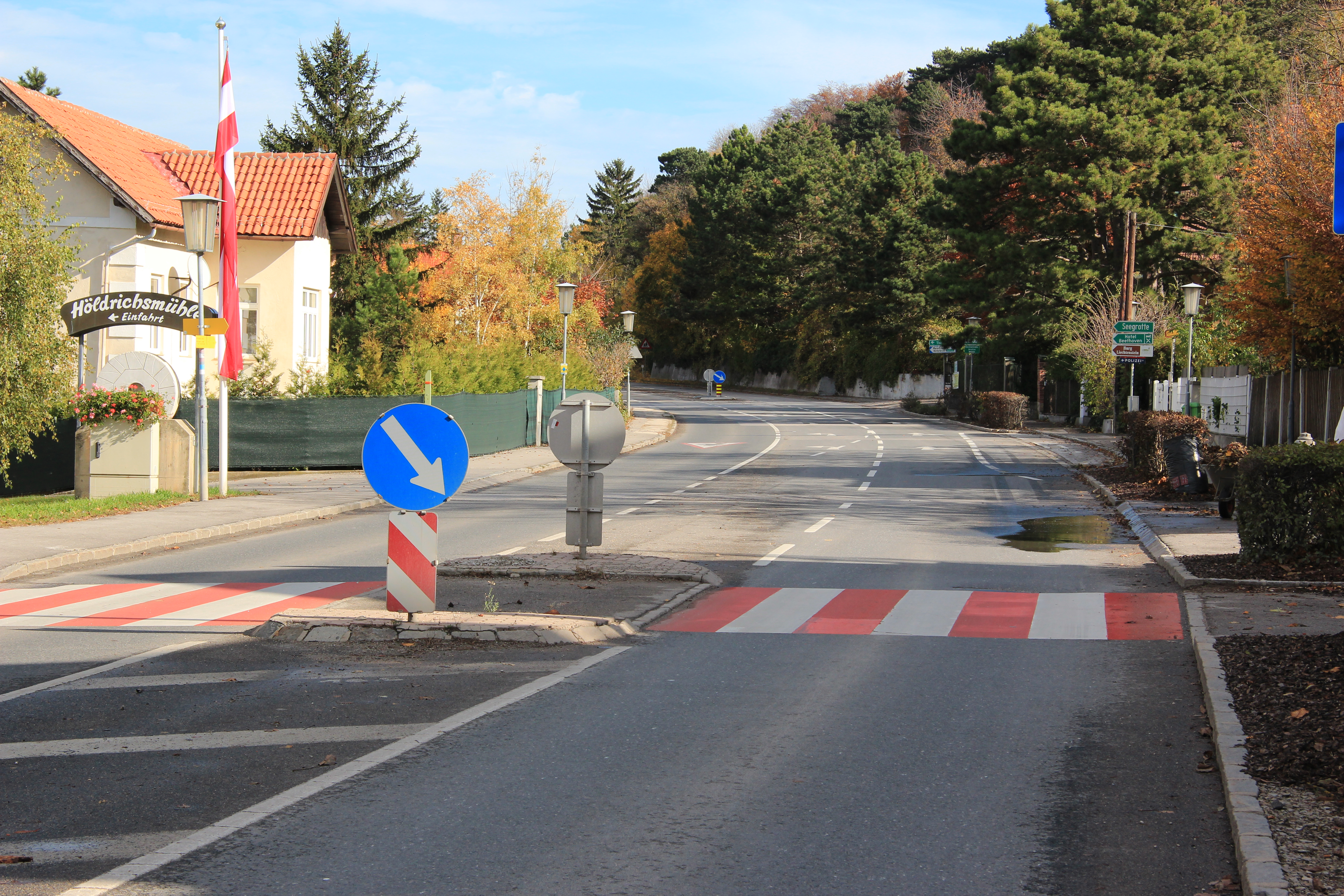 Fußgängerübergang in der HInterbrühl über die Mödlinger Straße